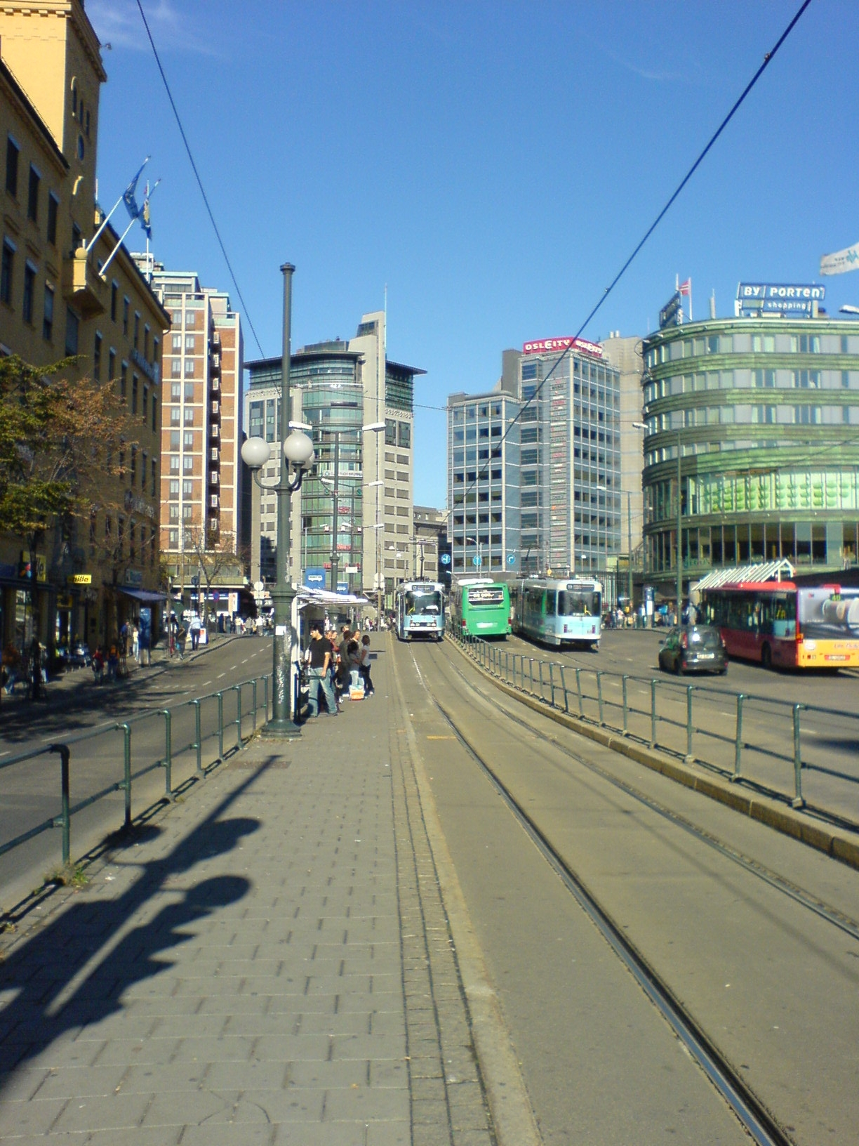 Fred Olsens gate i Oslo